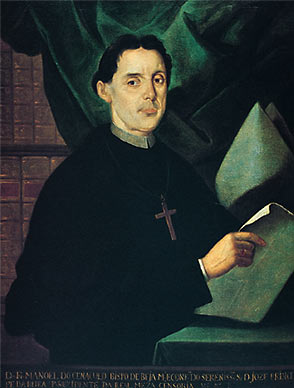 Frei Manuel do Cenáculo Vilas Boas, presidente da Real Mesa Censória, em Portugal.